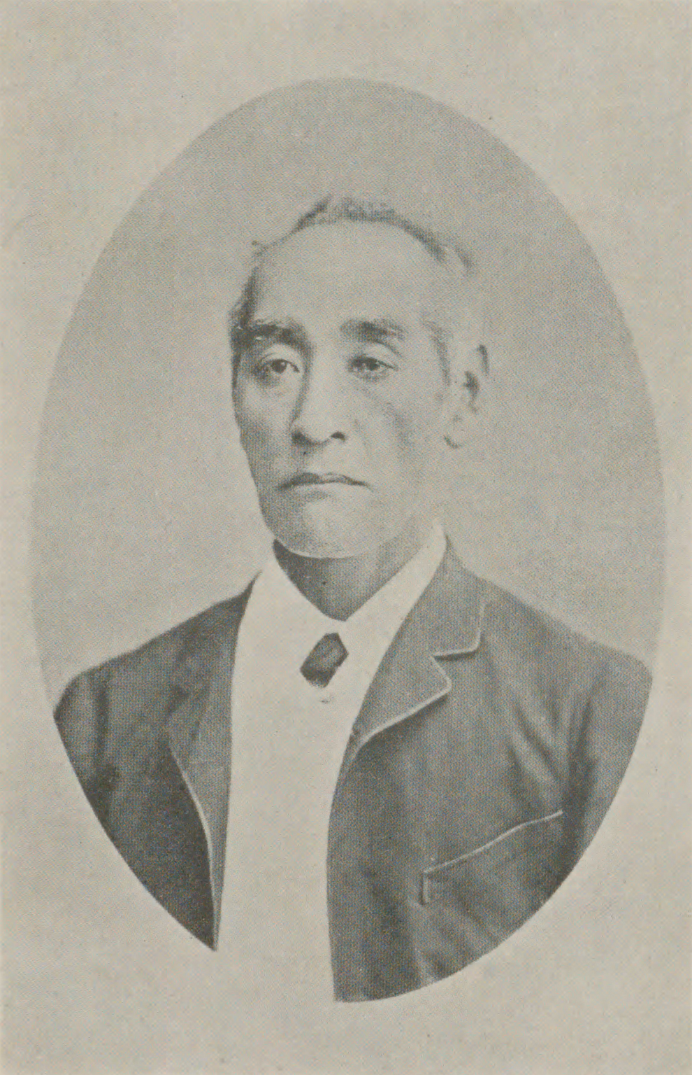 Portrait of Sugi Koji (杉亨二, 1828 – 1917)